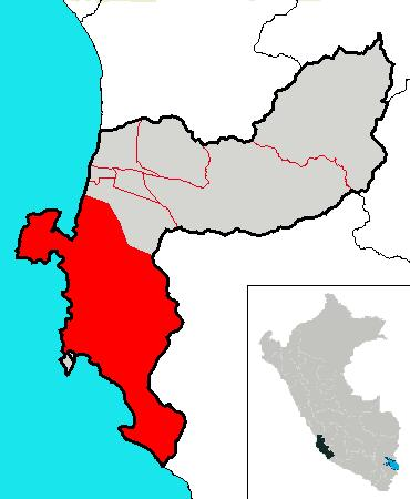 Ubicación del distrito de Paracas , en la provincia de Pisco , en la Región Ica.